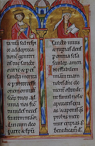 Přemysl Otakar I. a Konstancie Uherská